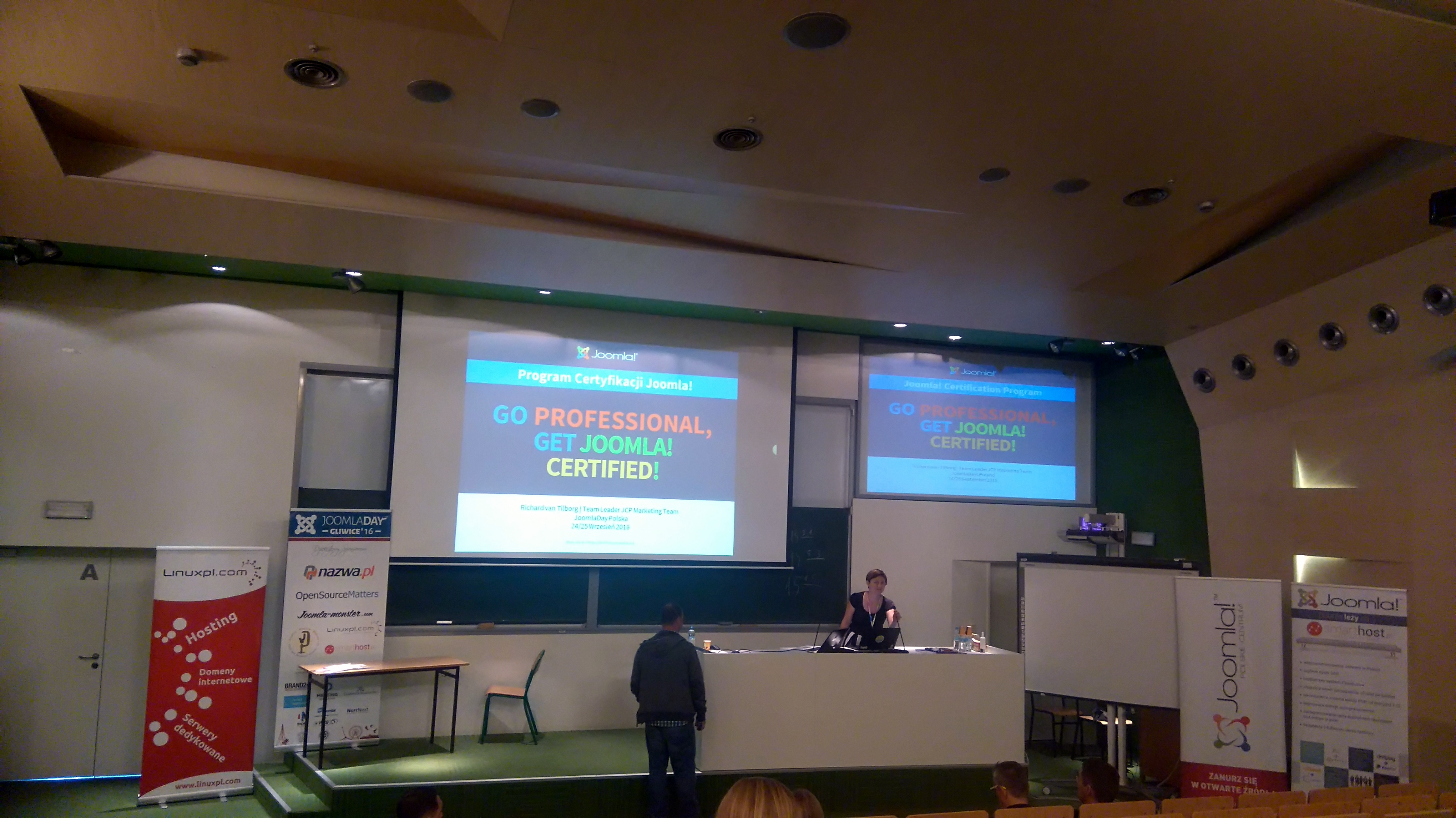 Joomla Day Poland 2016 - Gliwice